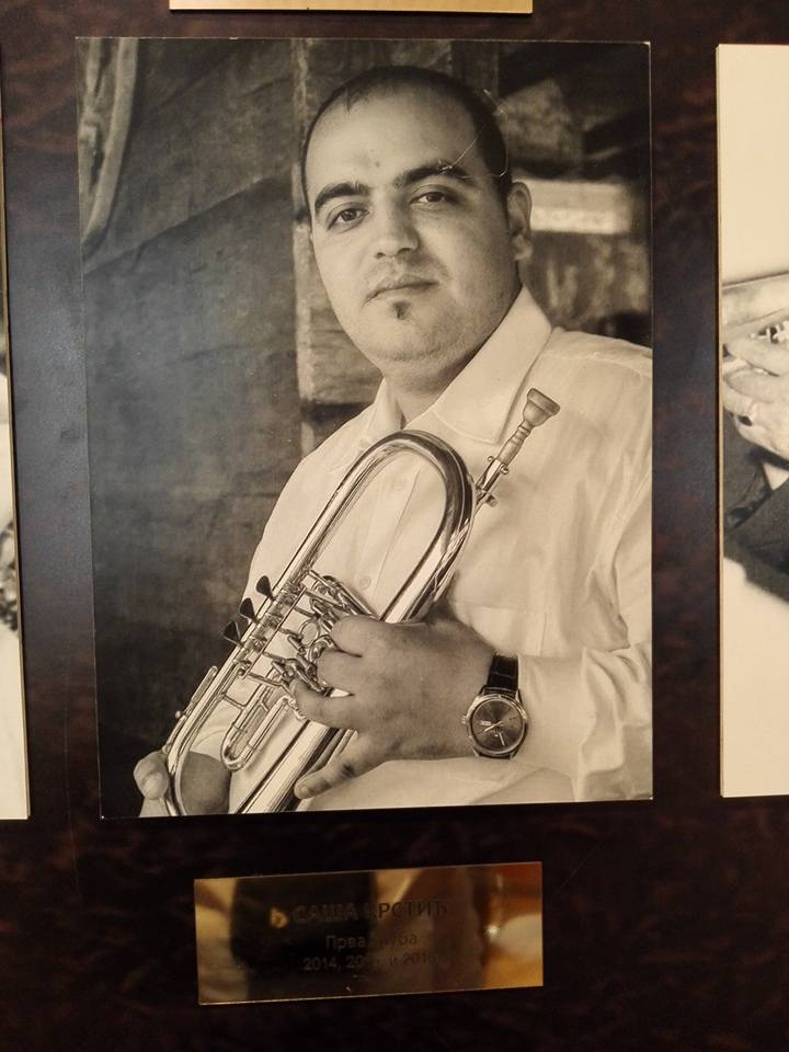 Саша У Гучи